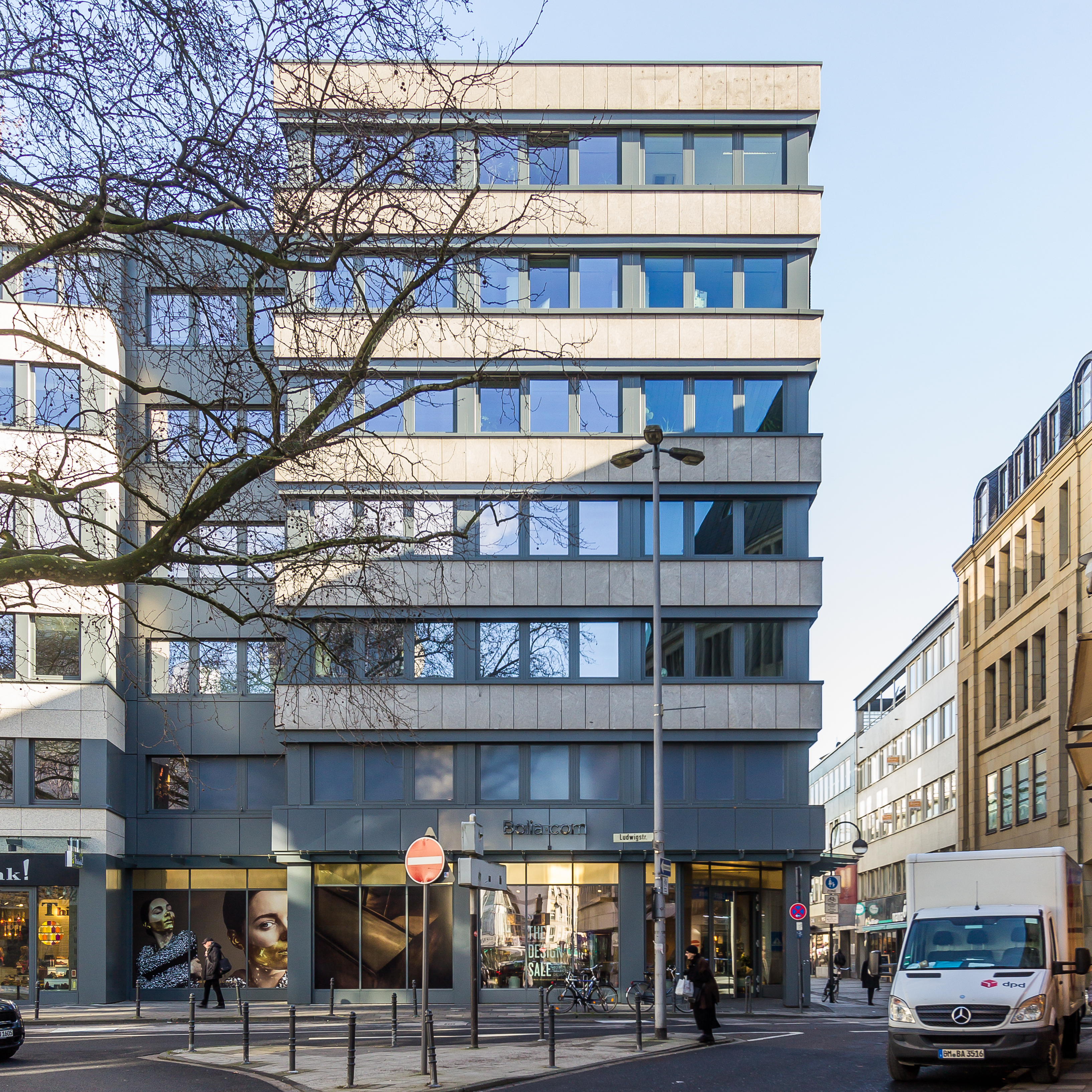 Büro- und Geschäftshaus Ludwigstraße 2